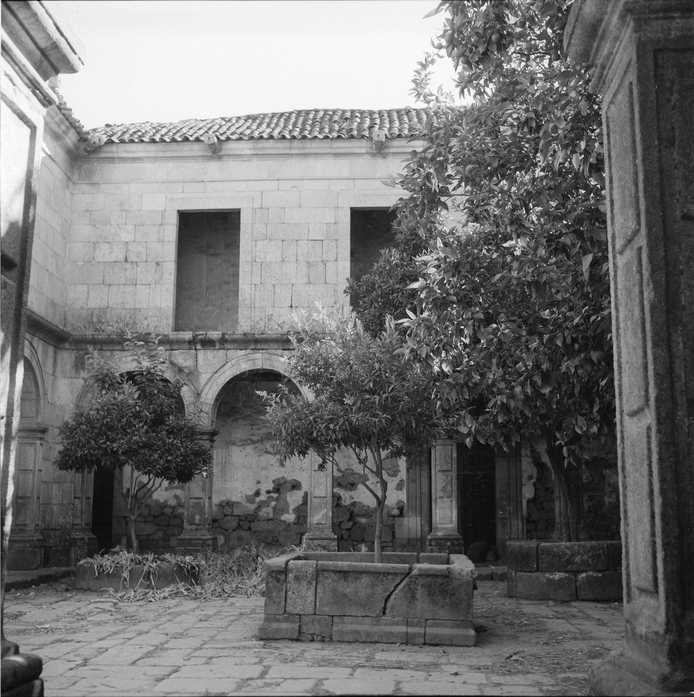 Fotógrafo: João Miguel dos Santos Simões (1907-1972). Data de produção da fotografia original: 1960-1970. [CFT009.2608n.ic]